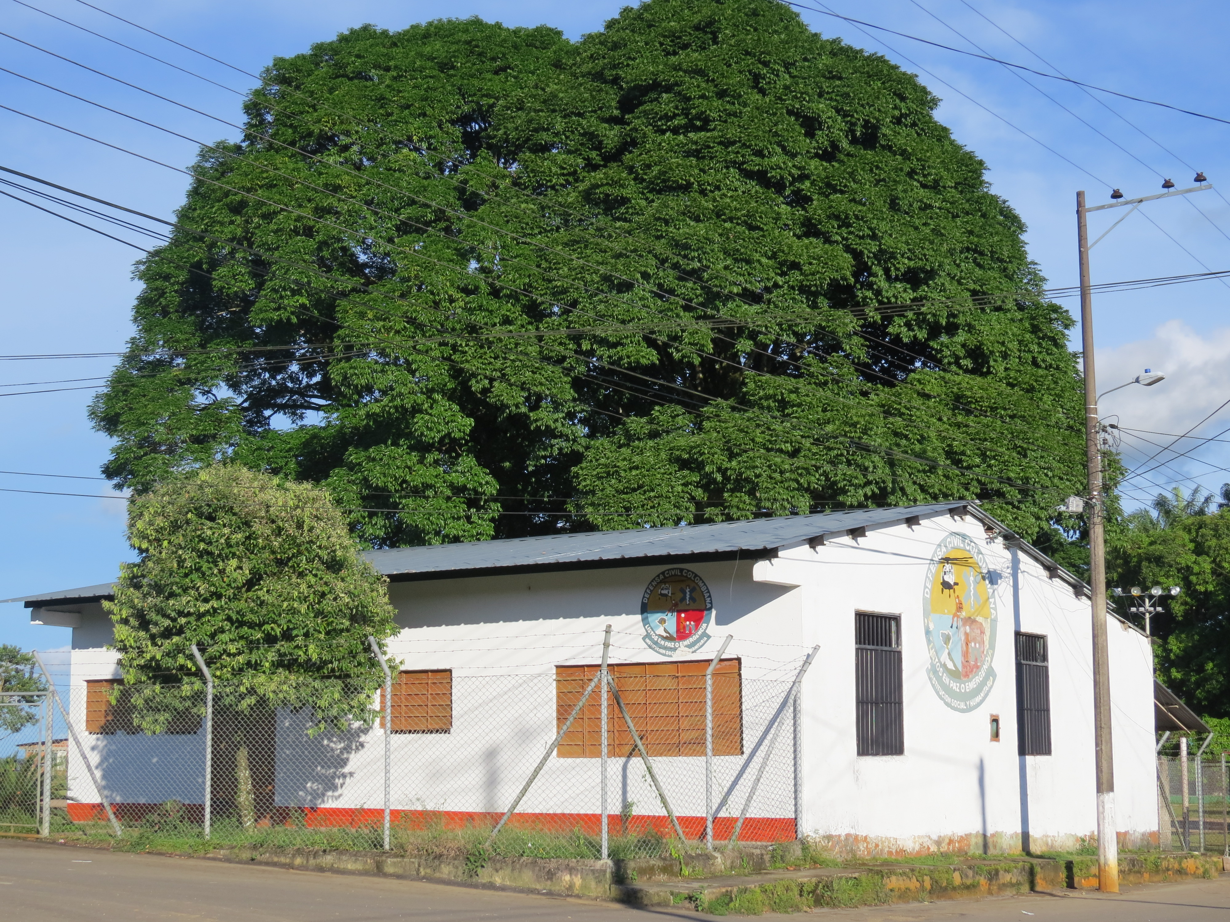 Organismo de ayudas creado el 16 de noviembre de 1978.